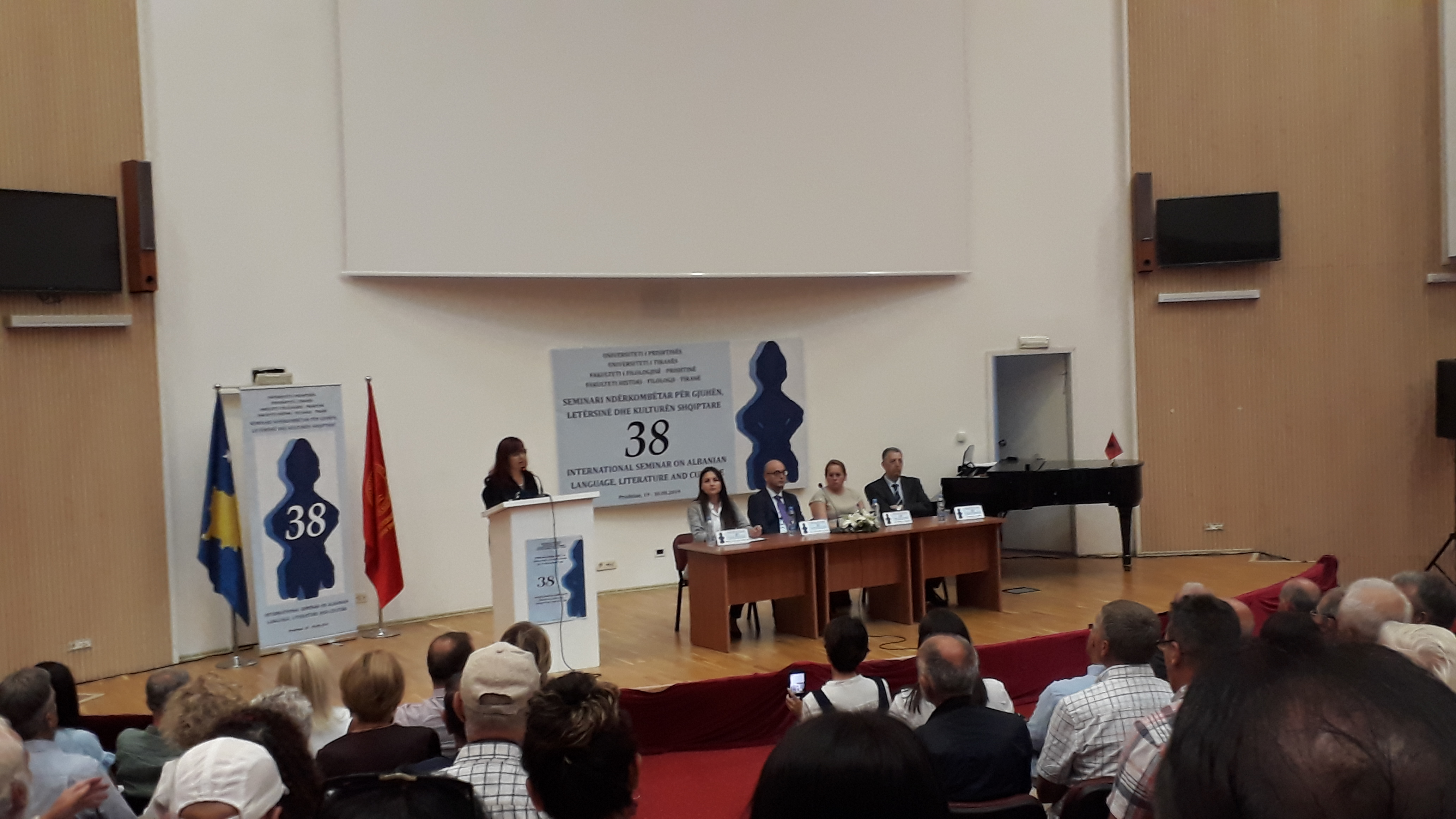 Hapja solemne e Seminarit Ndërkombëtar për Gjuhën, Letërsinë dhe Kulturën Shqiptare 2019